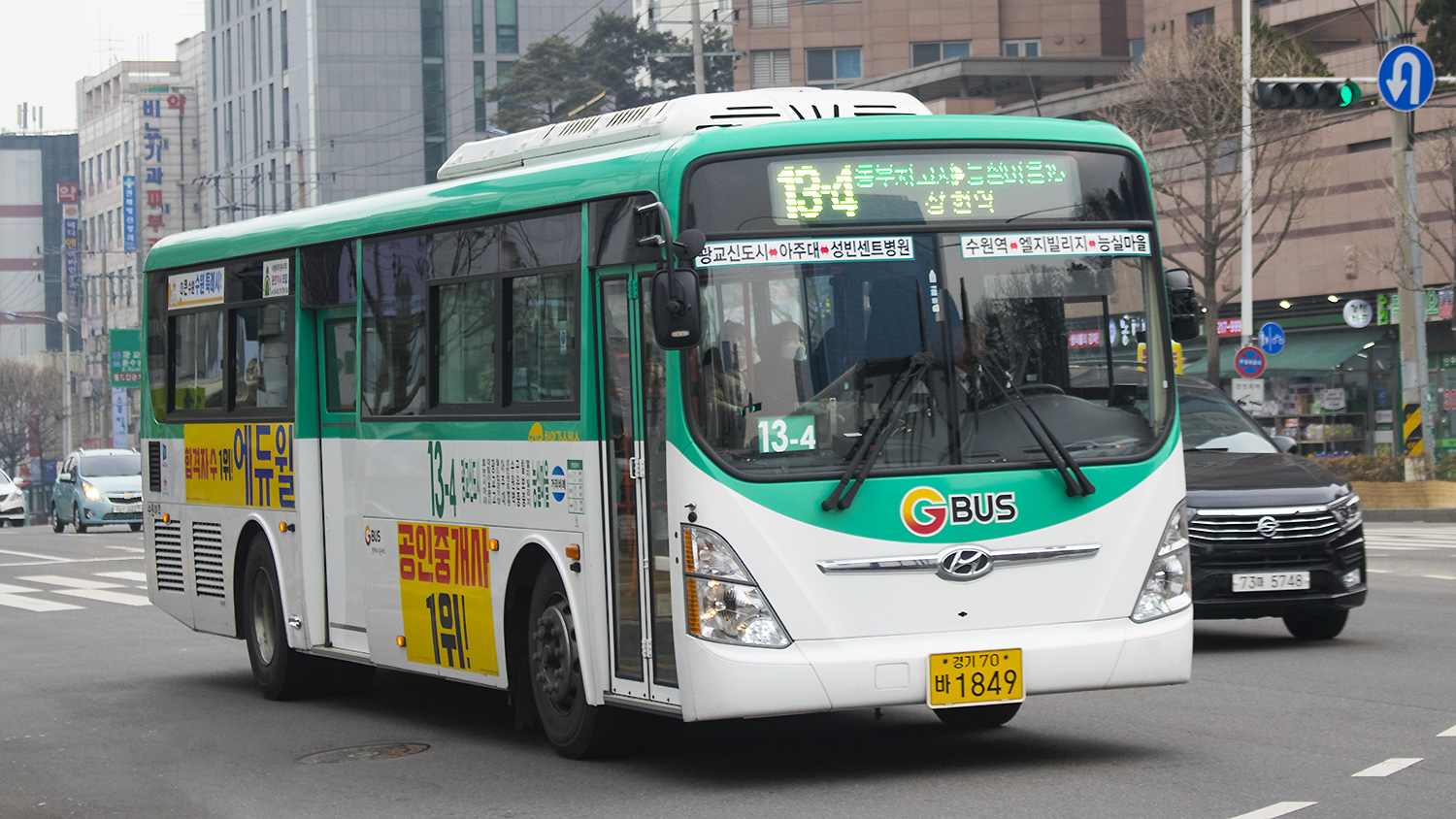 수원여객 13-4번 현대 뉴 슈퍼 에어로시티 F/L CNG